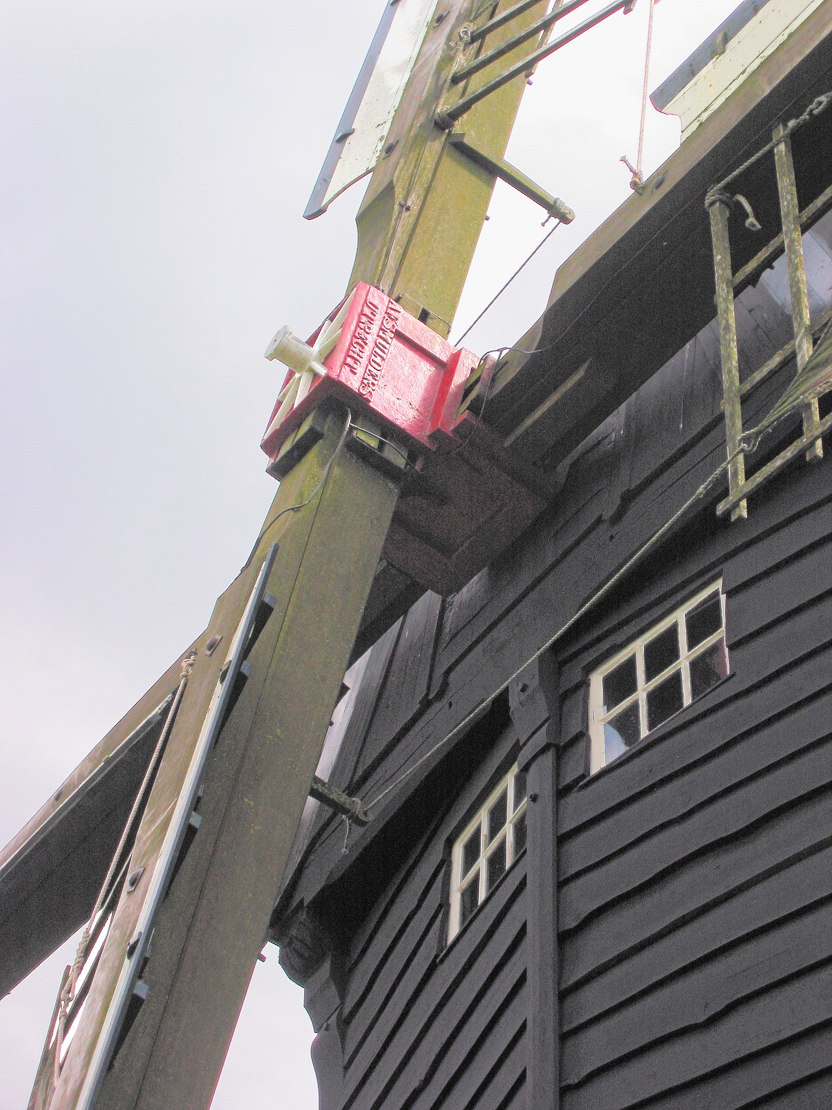 Askop van Doesburgermolen te Ede